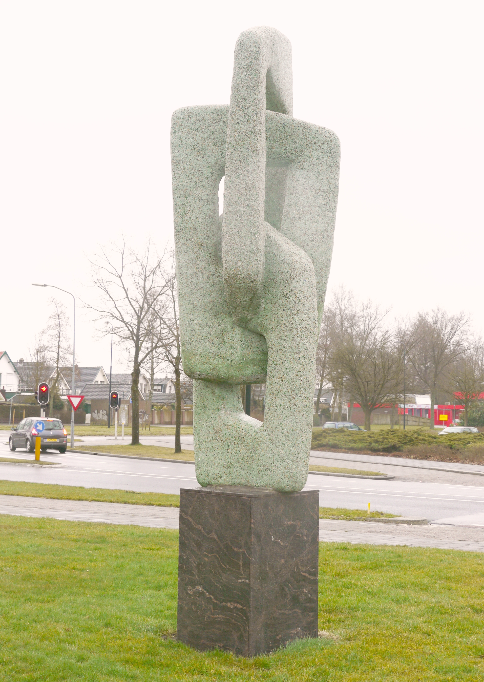 Sculptuur 'Verbondenheid', door Harry Meek. kunststeen op natuurstenen sokkelHoek Koninginnelaan - Gemzenstraat, Apeldoorn (NL)